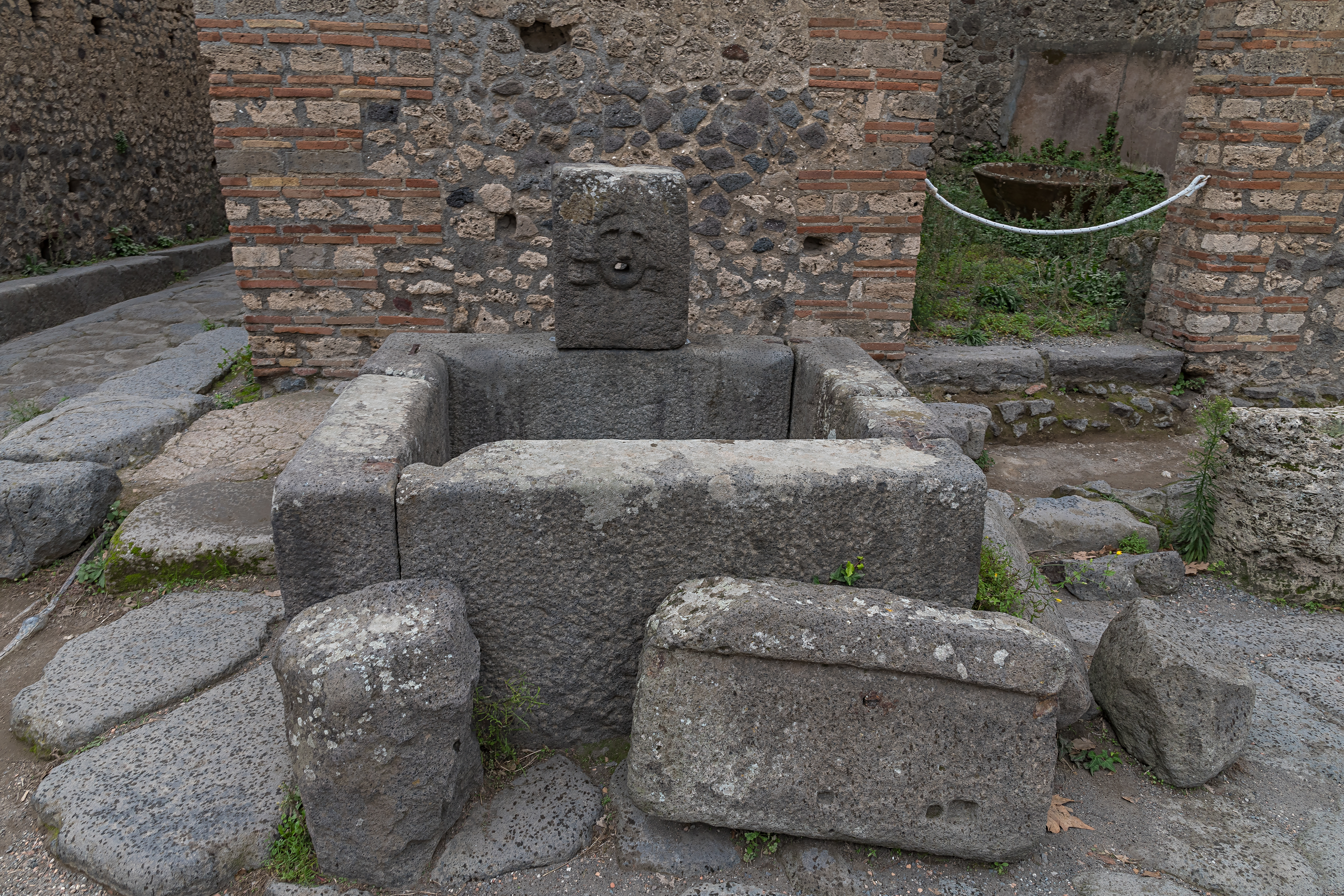 Öffentlicher Wasserbrunnen in Pompeji. Am linken Bildrand ist eine Bleirohrverbindung zu erkennen